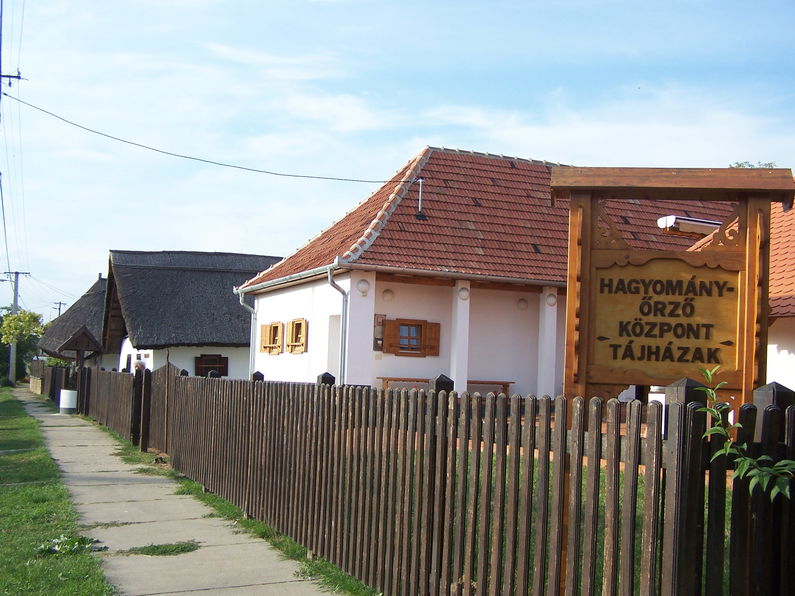 lakóház (Tard, Béke utca 57.) This is a photo of a monument in Hungary, Identifier: 3229